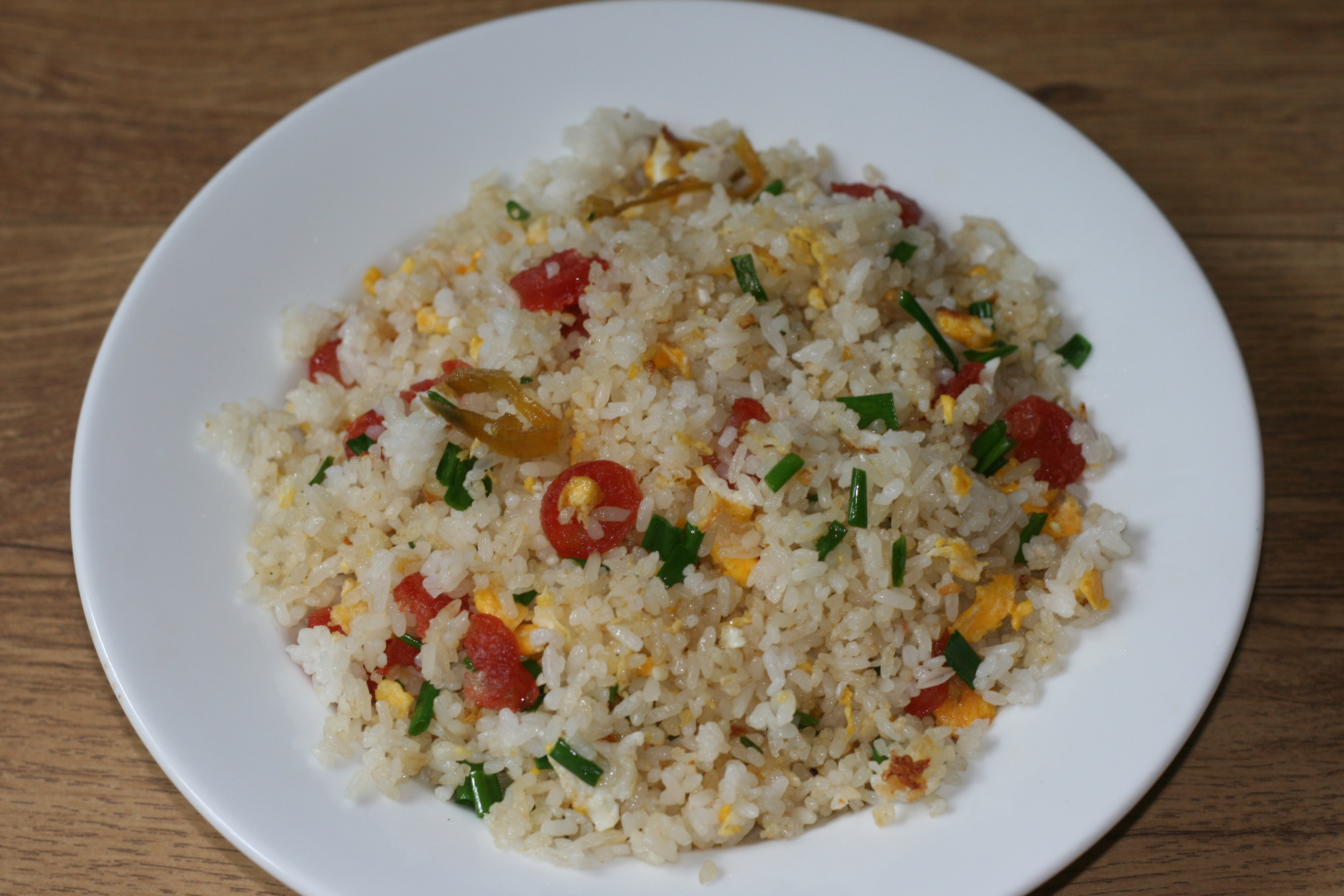 Một đĩa cơm chiên trong bếp ăn gia đình với cơm nguội, hành khô, trứng, lạp xưởng, hành lá. Người chế biến: Khương Việt Hà